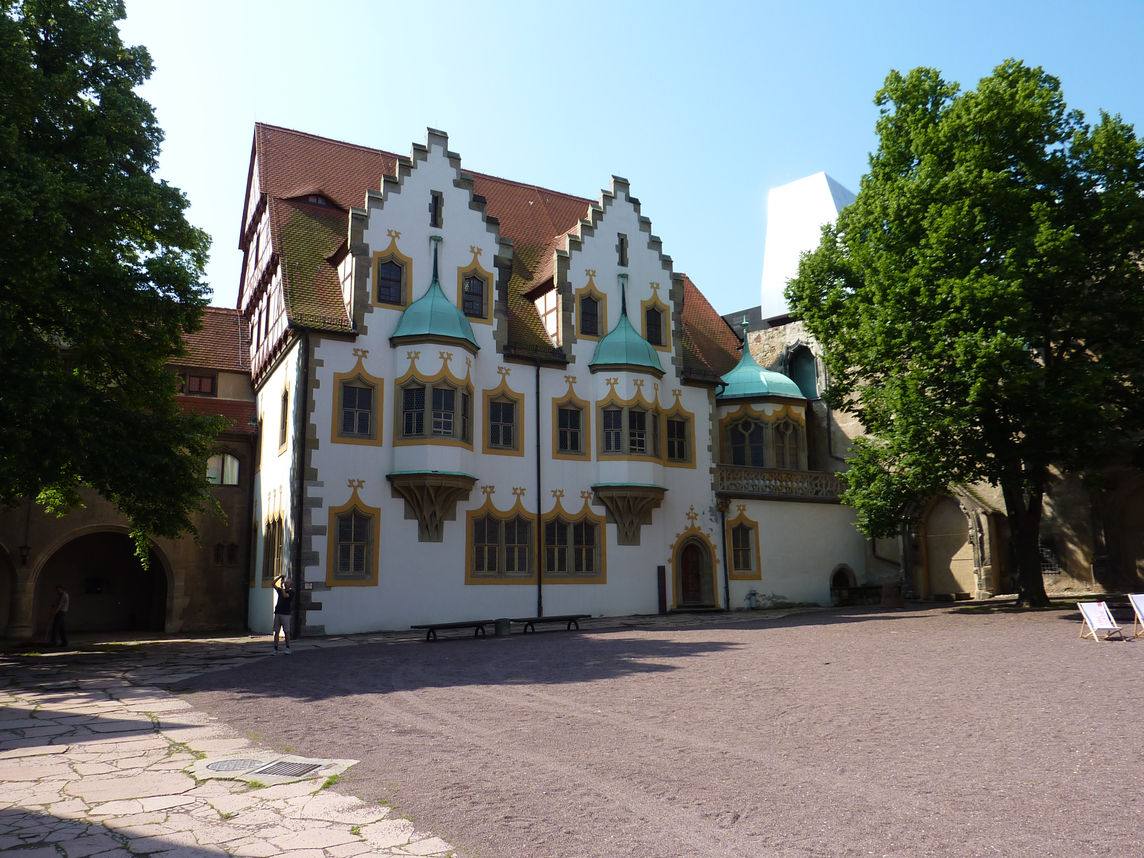 Altstadt, 06108 Halle (Saale), Germany